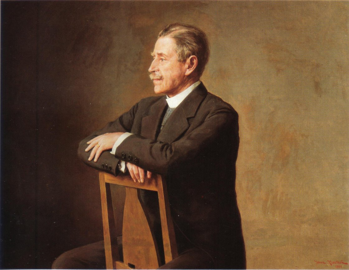 Portrait of Verner von Heidenstam